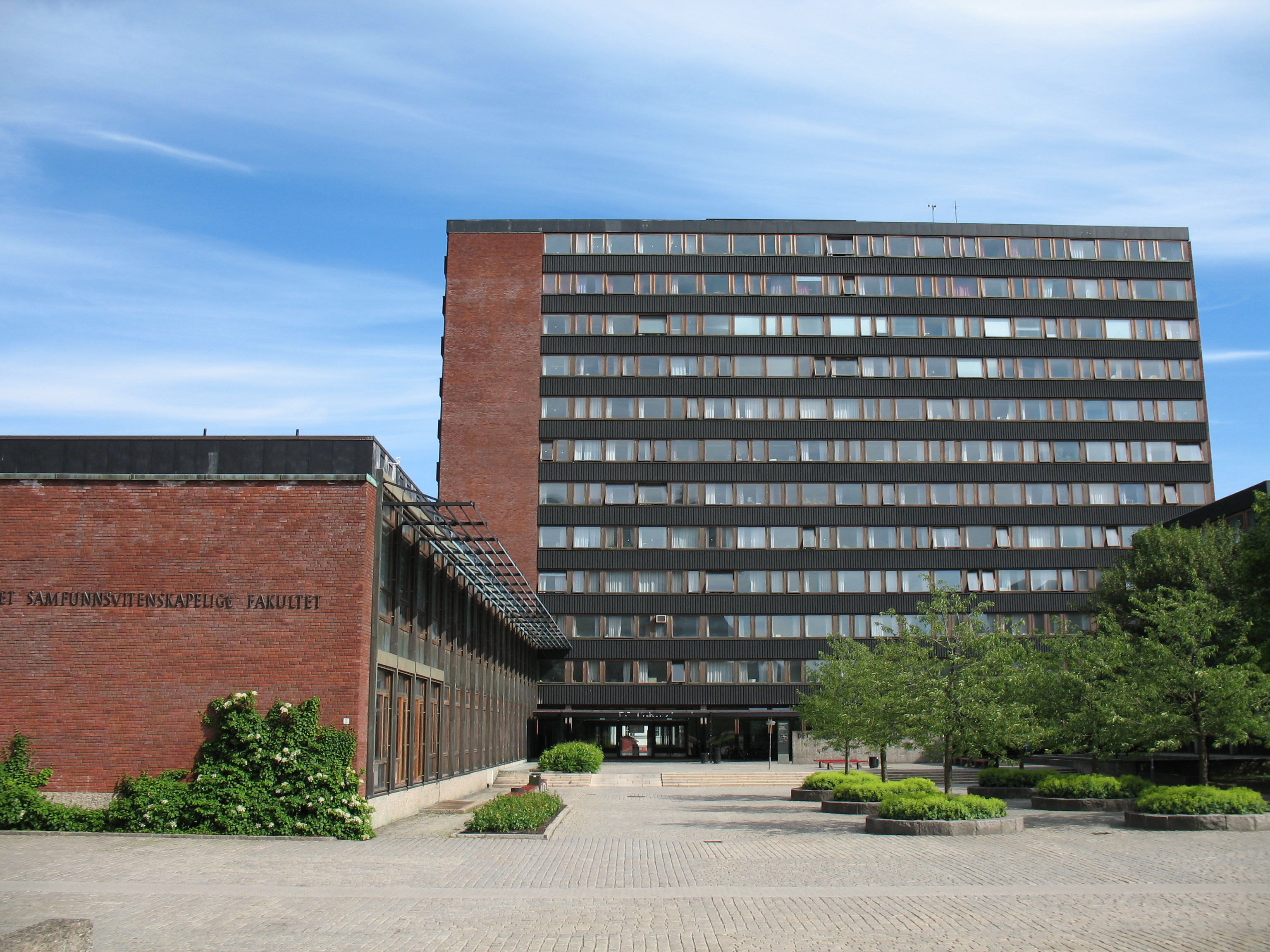 Eilert Sundts hus. The University of Oslo